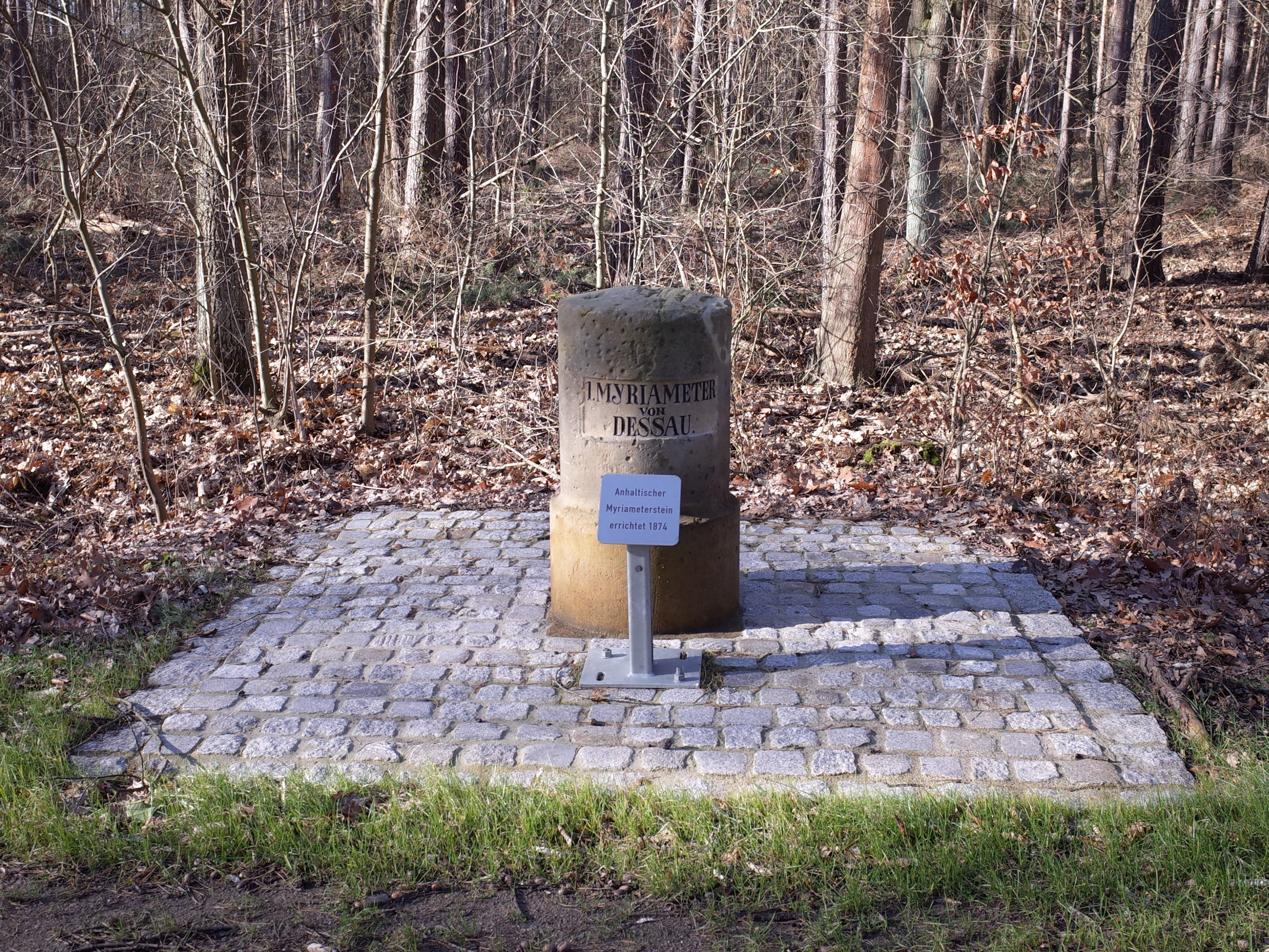 Lingenau, Anhaltischer Myriameterstein.